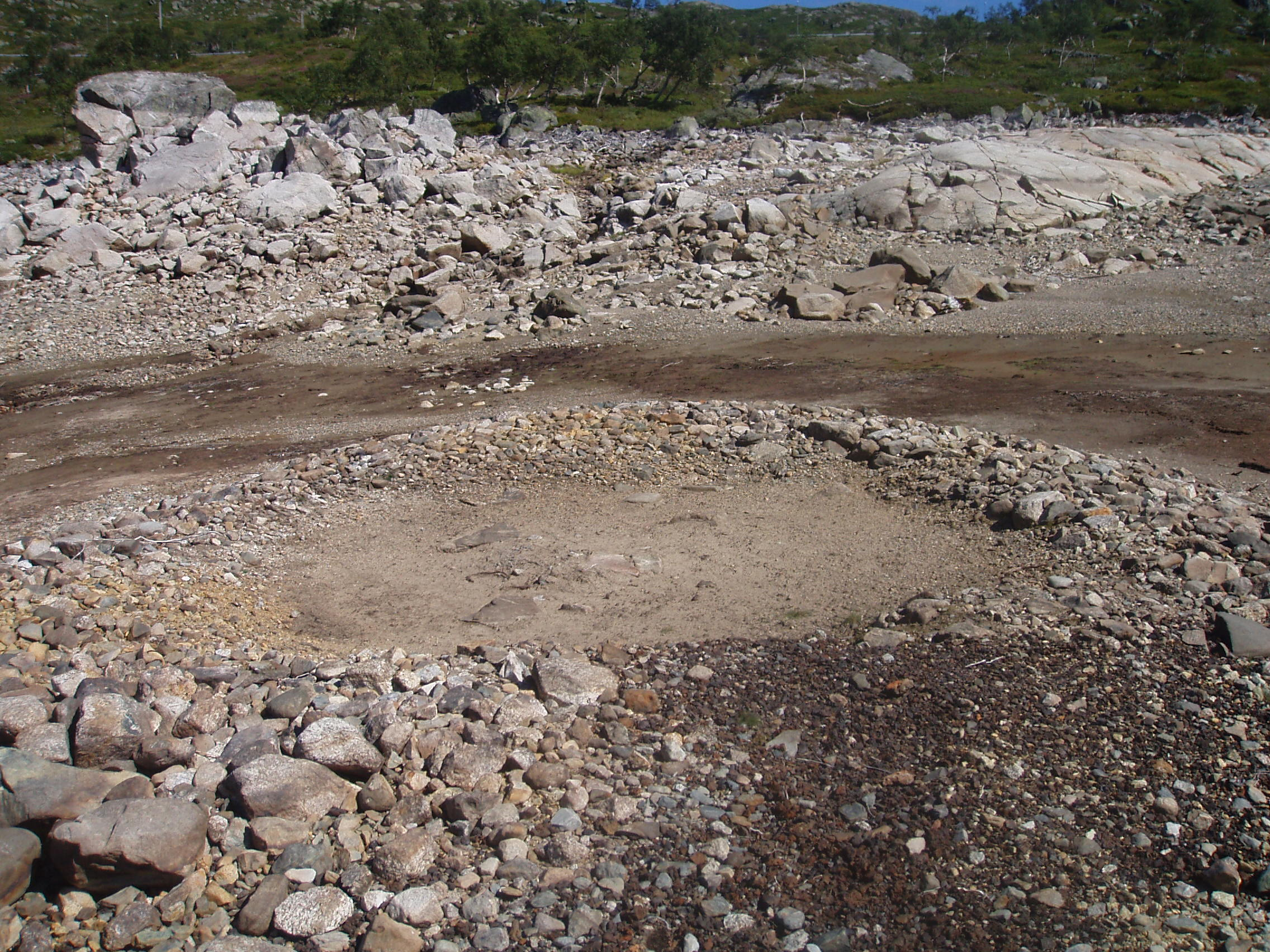 Jernframstillingsstad frå yngre Jernalder i Telemark, vassdragsregulering har gjort at torva har vorte vaska vekk.